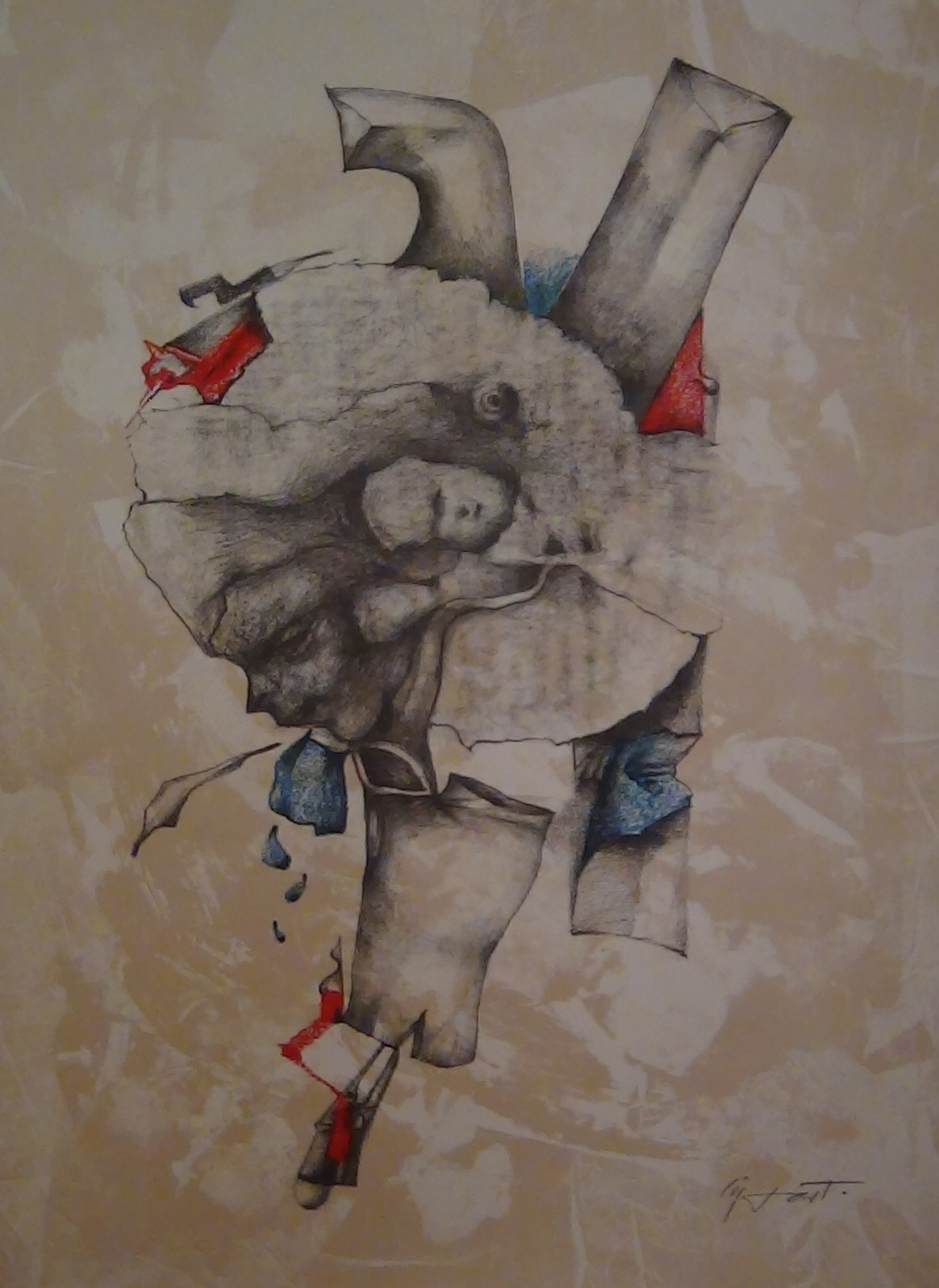 Obra de Modest Cuixart per al cartell d'un Congrés de Cardiologia celebrat a Barcelona. És un exemple de la seva tasca filantròpica.